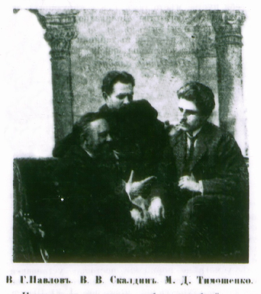 Русские баптисты В. Г. Павлов, В. В. Скалдин, М. Д. Тимошенко